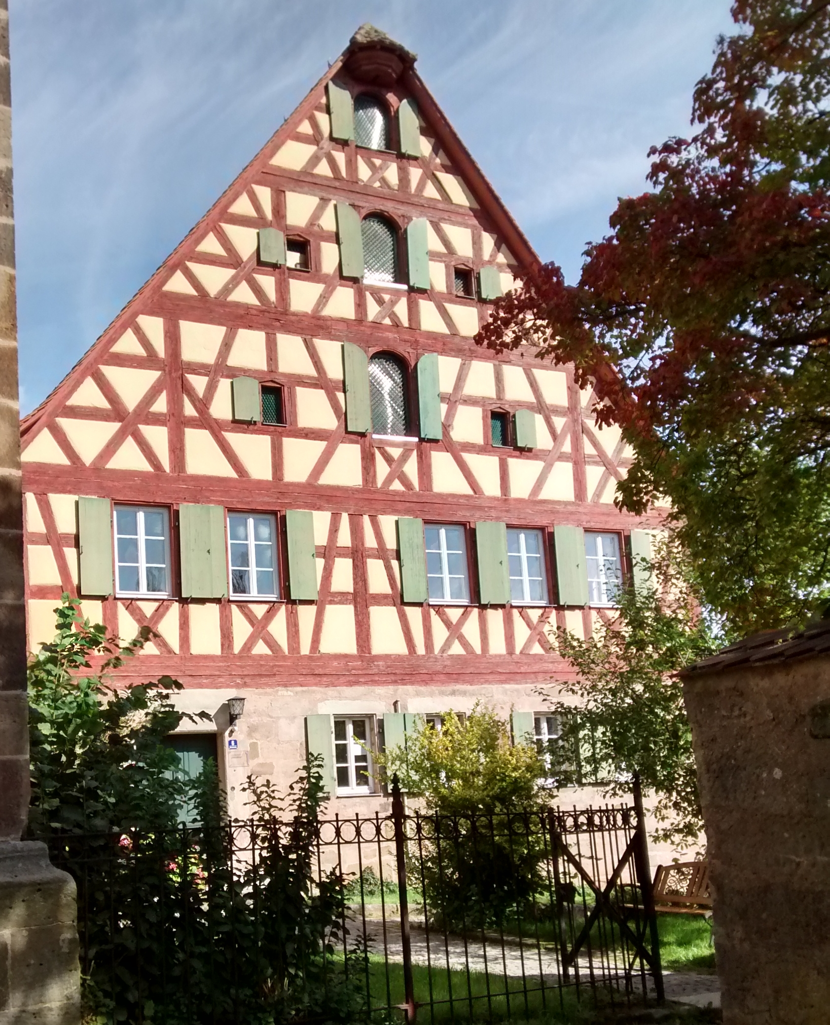 Evang. Pfarramt in Dietenhofen, heute Gemeindehaus